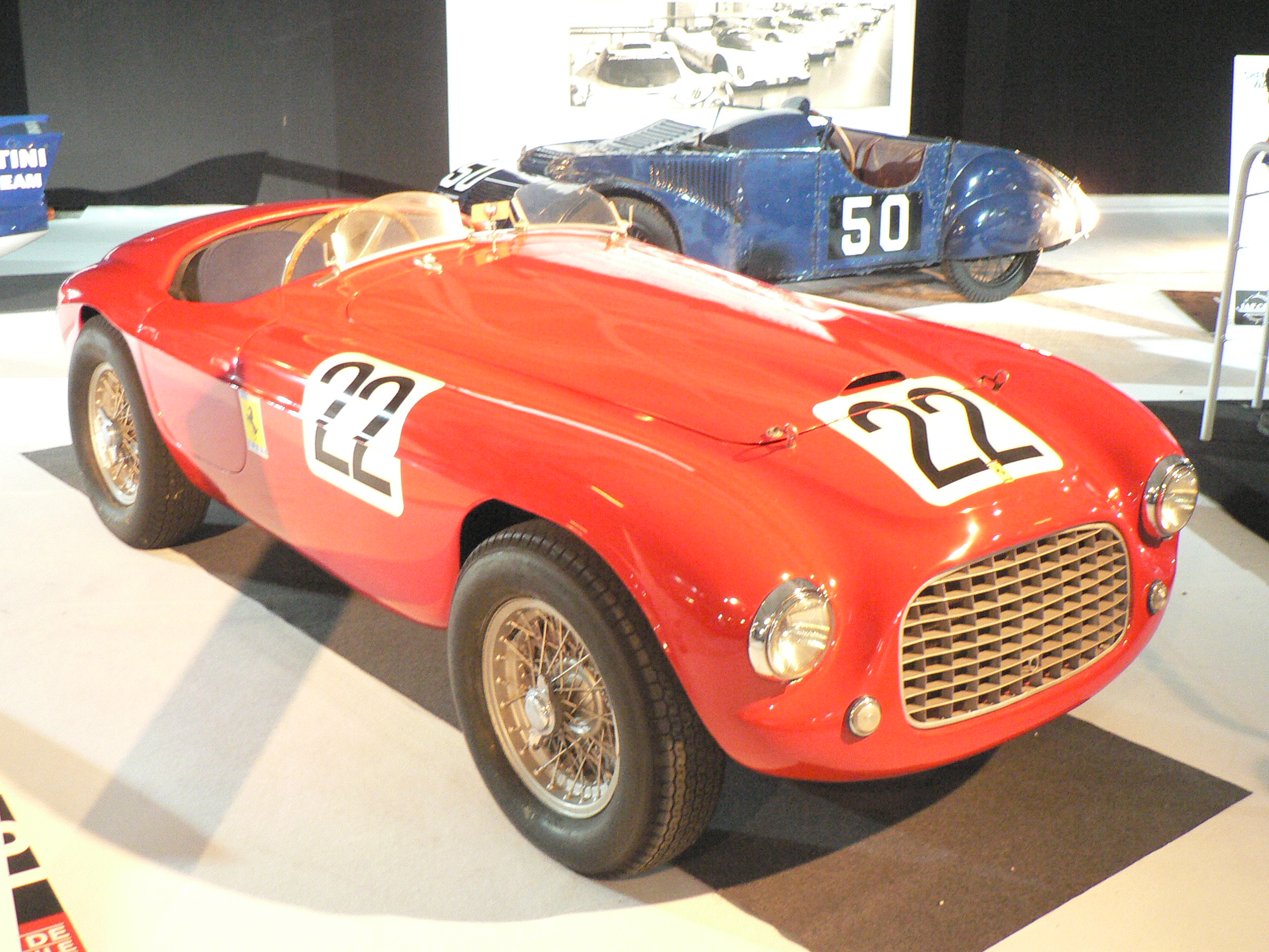 Ferrari 166 MM Touring Barchetta, telaio n. 0014M,[1] esposta al Mondial de l'automobile de Paris nel 2006 Mondial de l automobile de Paris (October 2006) References ↑ 0014M at barchetta.cc.